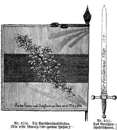 Die Schwarz- Rot- Goldene Fahne vom 12. Juni 1815. In der Grafik sind die senkrechten Striche zu sehen, die die Farbe Rot bedeuten. Die Farbe Schwarz wird mit waagerechten und senkrechten Querlinien dargestellt. Die Farbe Gold ist golden und daher hat sie keine Strichlinien. Dies ist auch eine grafische Lösung Farben zu zeigen, wenn diese nicht gedruckt werden können. Dies findet auch Verwendung in plastischen Wappen aus Stein, zum Beispiel, wenn diese nicht bemalt sind.